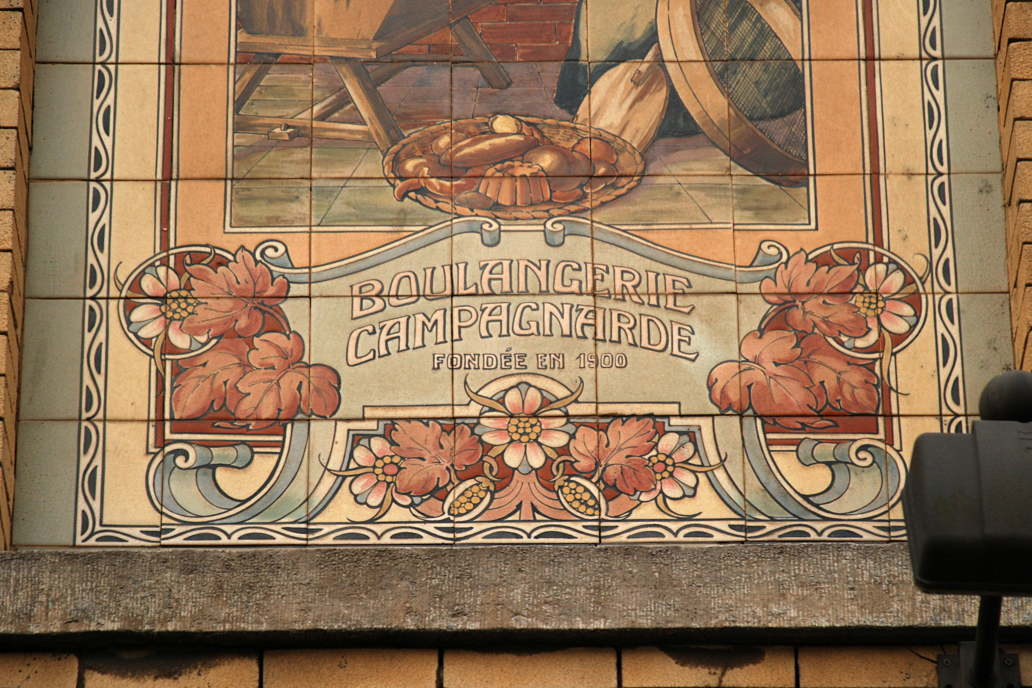 Belgique - Bruxelles - Berchem-Sainte-Agathe - Chaussée de Gand 1224 - Art nouveau - Célestin Joseph Helman